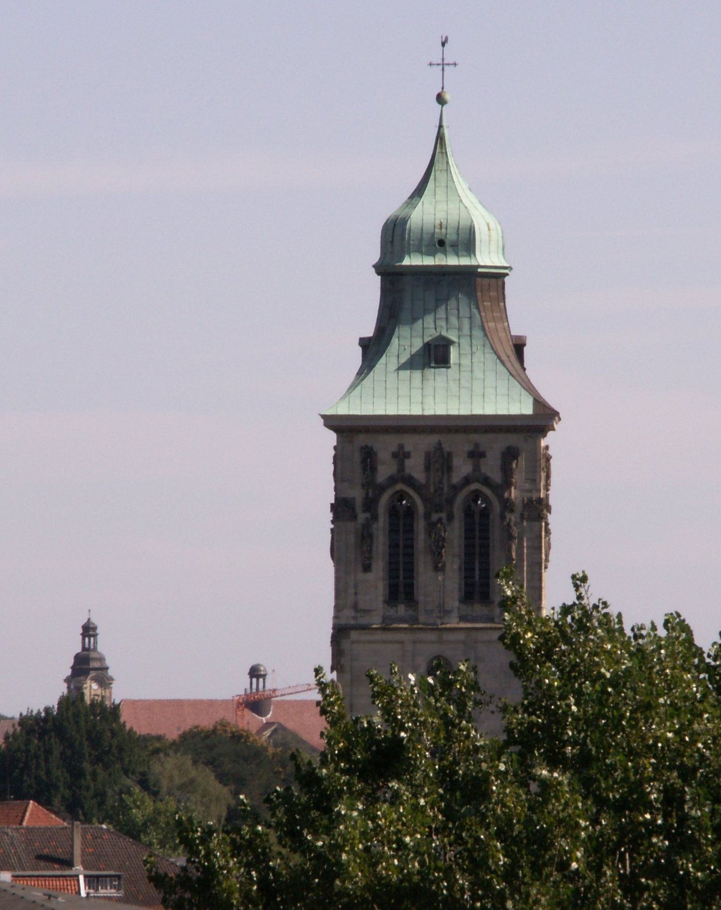 Münster, Deutschland: Turm der St.Martini-Kirche